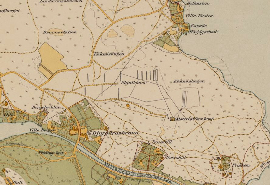 Del av 1934 års karta över Stockholm med omgivningar visande Kaknäs skjutbanor